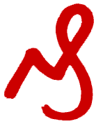 Deleatur - korektorská značka označující požadavek na vymazání písmenka Domnívám se, že samotný symbol není chráněn, neboť je to mezinárodně známý korektorský symbol. Obrázek jako takový jsem dělal já sám.